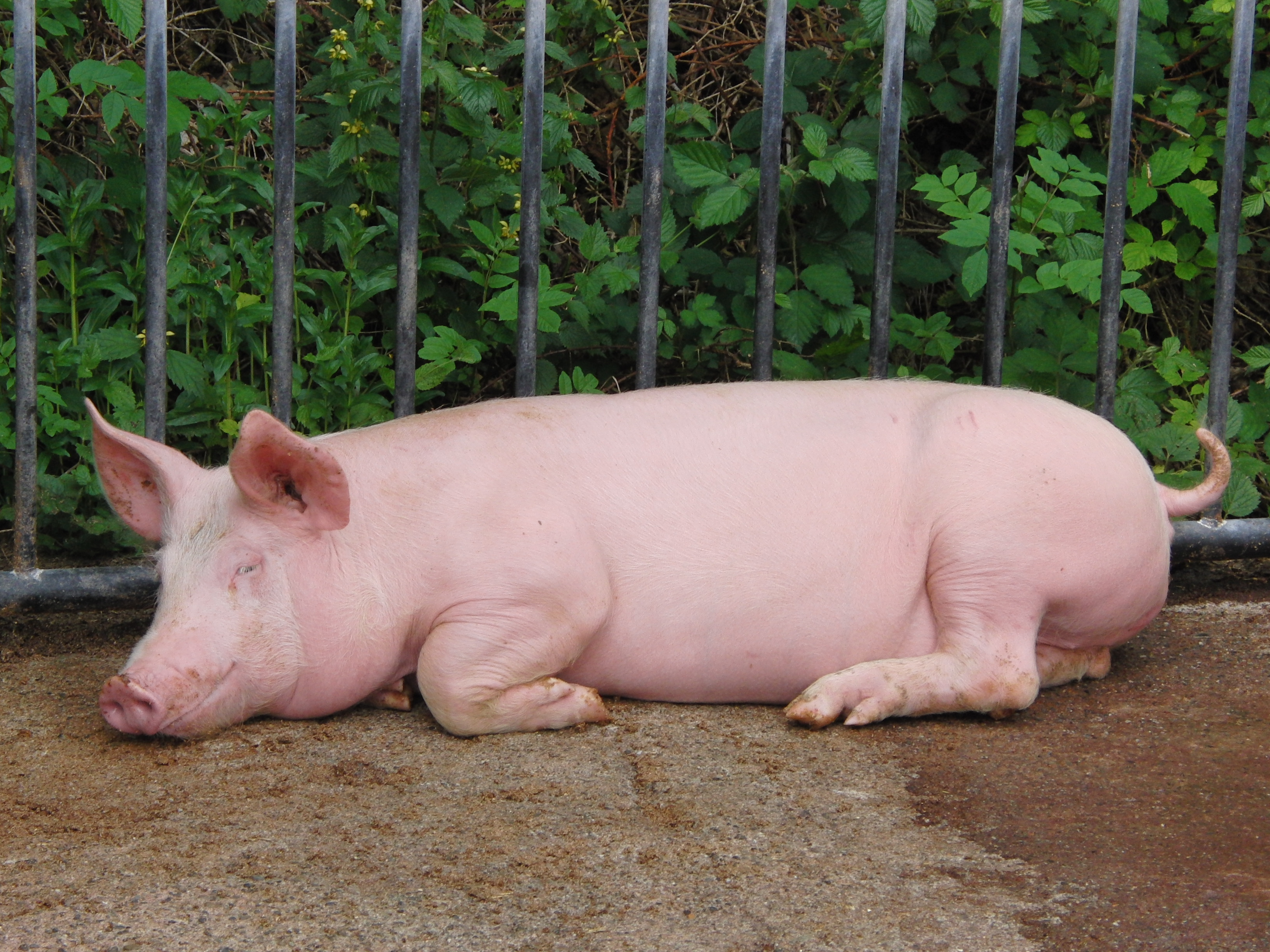 Cochon, Sewen, Haut-Rhin, France